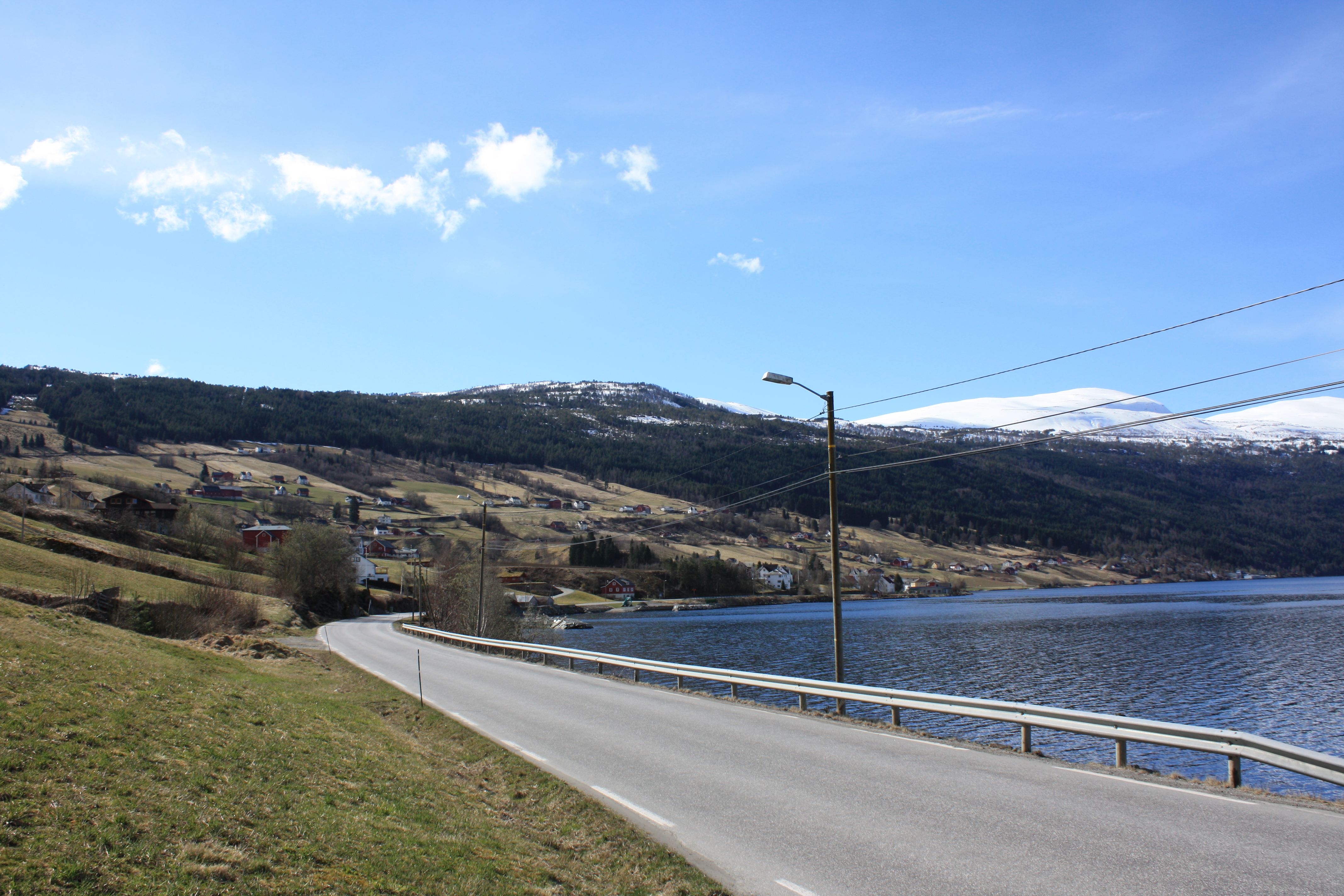 Bygda Utvik sett fra nordøst.